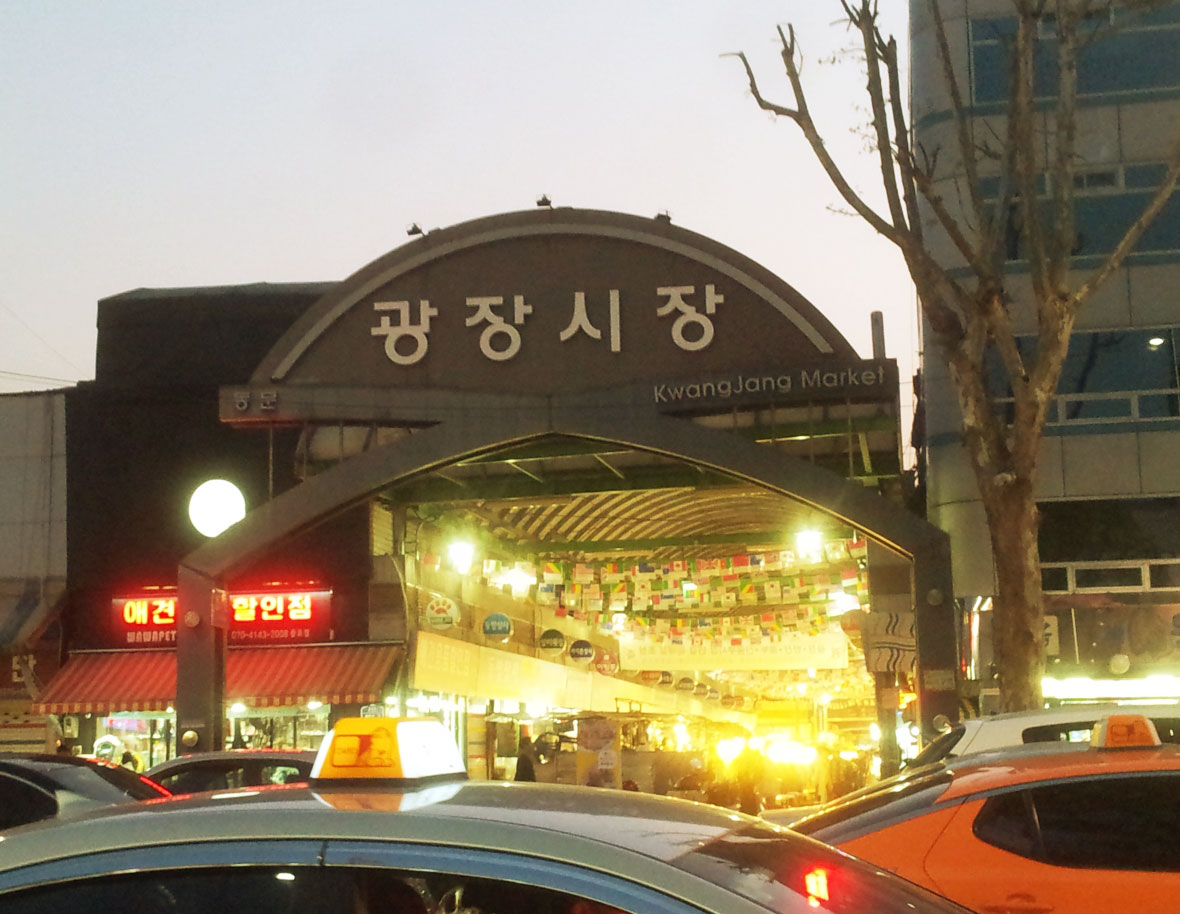 Outside the Gwangjang Market